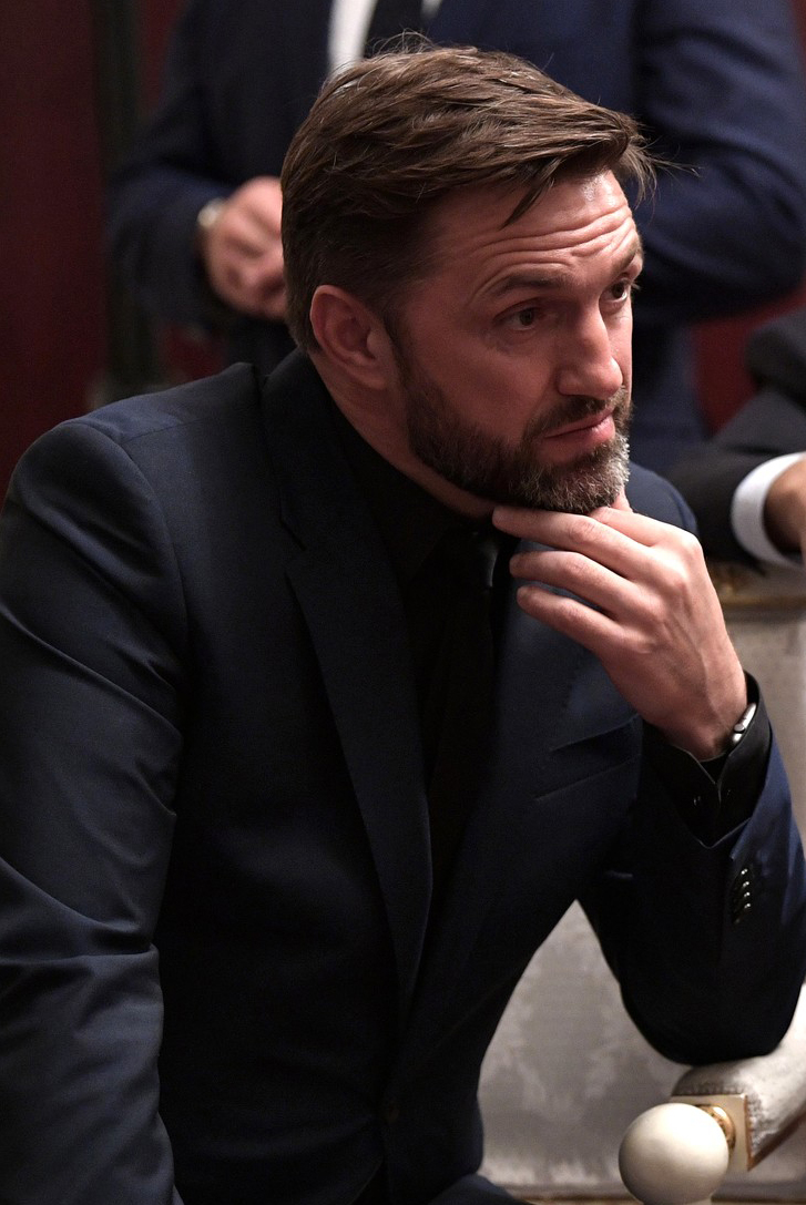 Актёр Владимир Вдовиченков во время встречи Президента России Владимира Путина со съёмочной группой фильма «Салют-7».